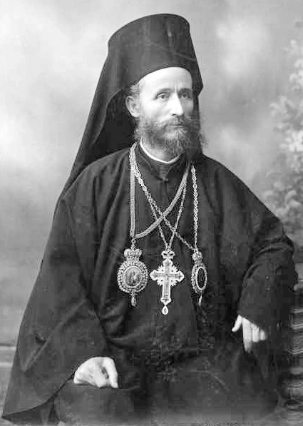 Μητροπολίτης Ρεθύμνου Χρύσανθος